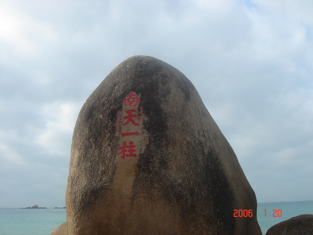 南天一柱，宣统元年永安范云梯题，位于中国海南省三亚市天涯海角风景旅游区内